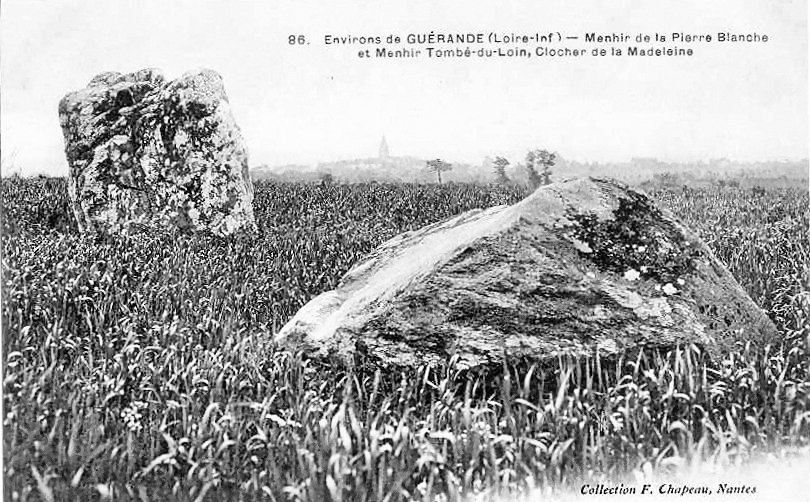 menhir Bissin- Guérande (Loire-Atlantique) - France